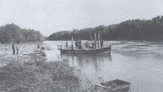 azagra